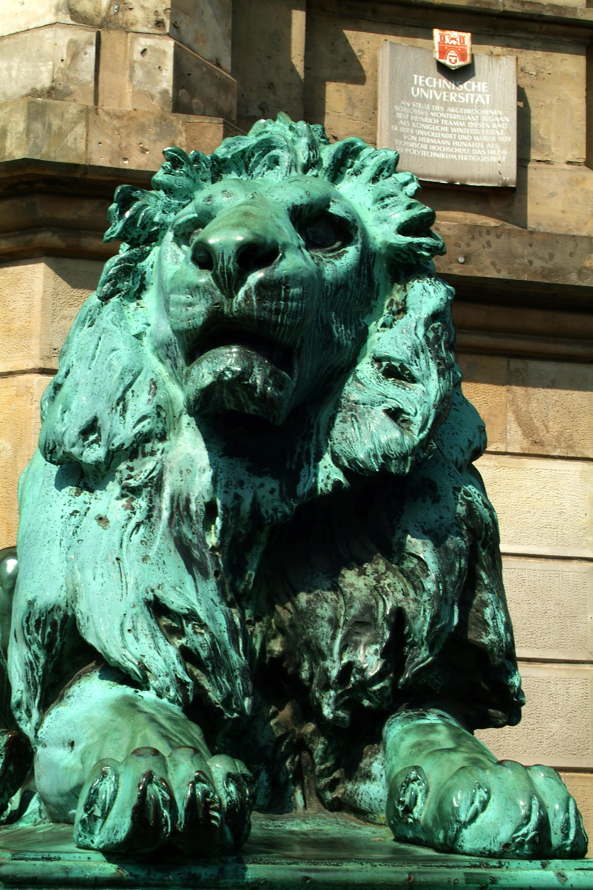 Bronzelöwe von Adolf Rosenthal